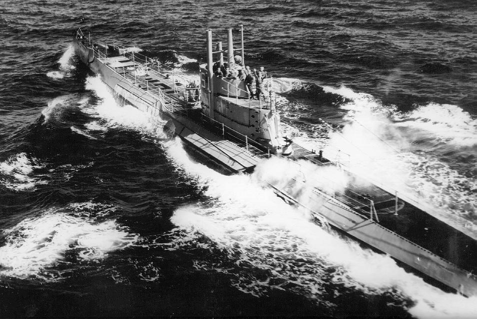 Submarino ARA Santa Fe (S-1)